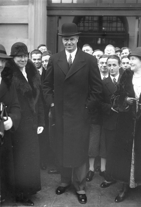 Reichsgründungsfeier der Studentenschaft am 18. Januar in der Universität zu Berlin ! Der Berliner Oberbürgermeister Dr. Sahm begibt sich zur Reichsgründungsfeier in die Berliner Universität.